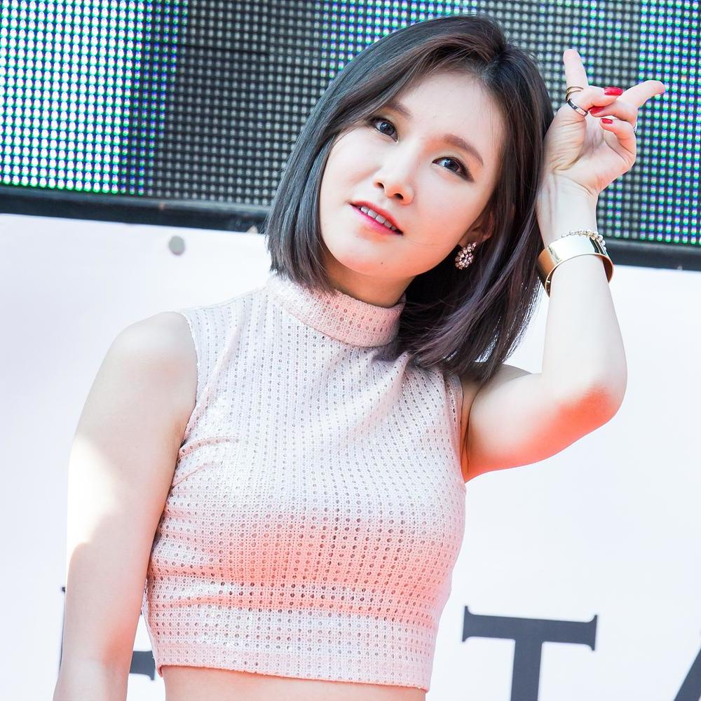 150314 명동.피에스타.게릴라.